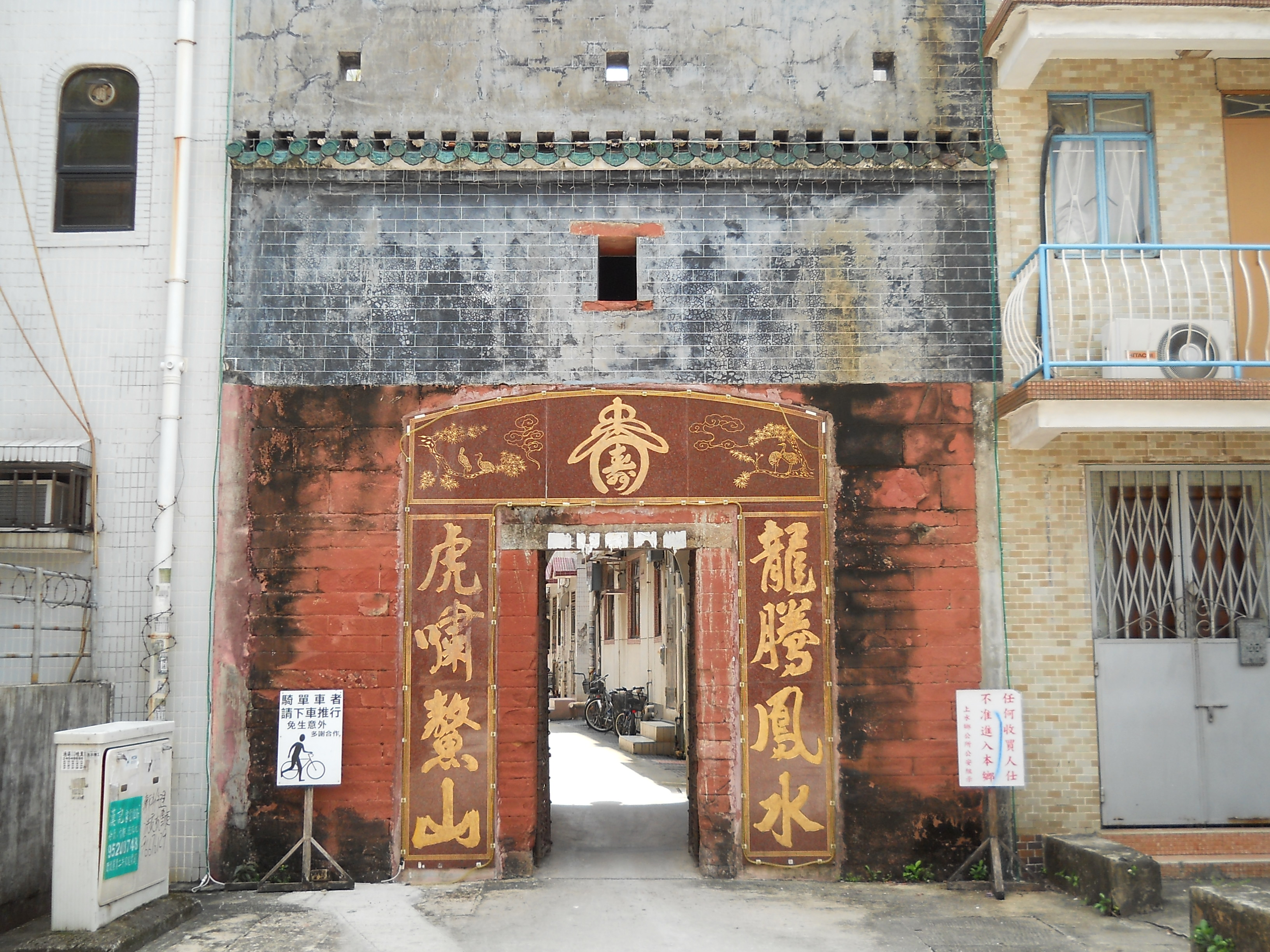 中文（香港）: 上水圍圍門